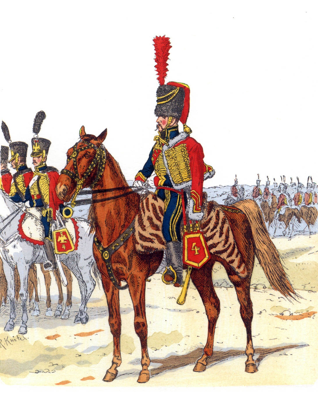 4e régiment de hussards, officier et soldats.